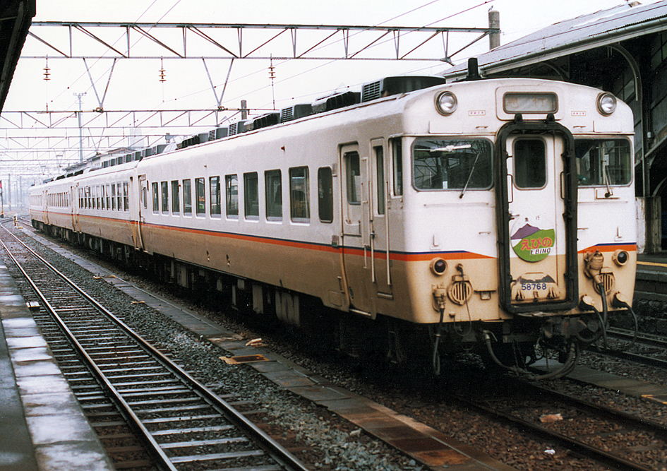 JR九州 急行「えびの」 キハ58 768 JR九州急行色